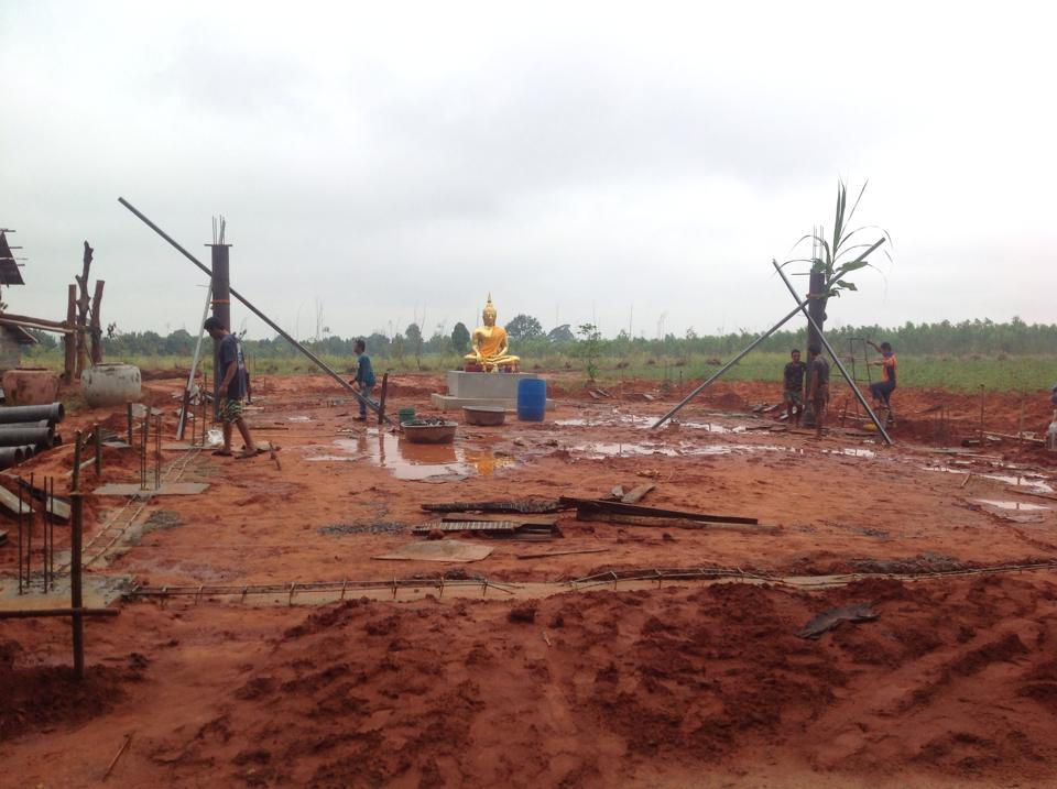 ด้วยบุญยาธิการของท่านผู้เจริญได้สร้างบารมี ได้มาอยู่ที่วัดบ้านอรุณพัฒนา จึงมีการพัฒนาเกิดขึ้นตามลำดับการ